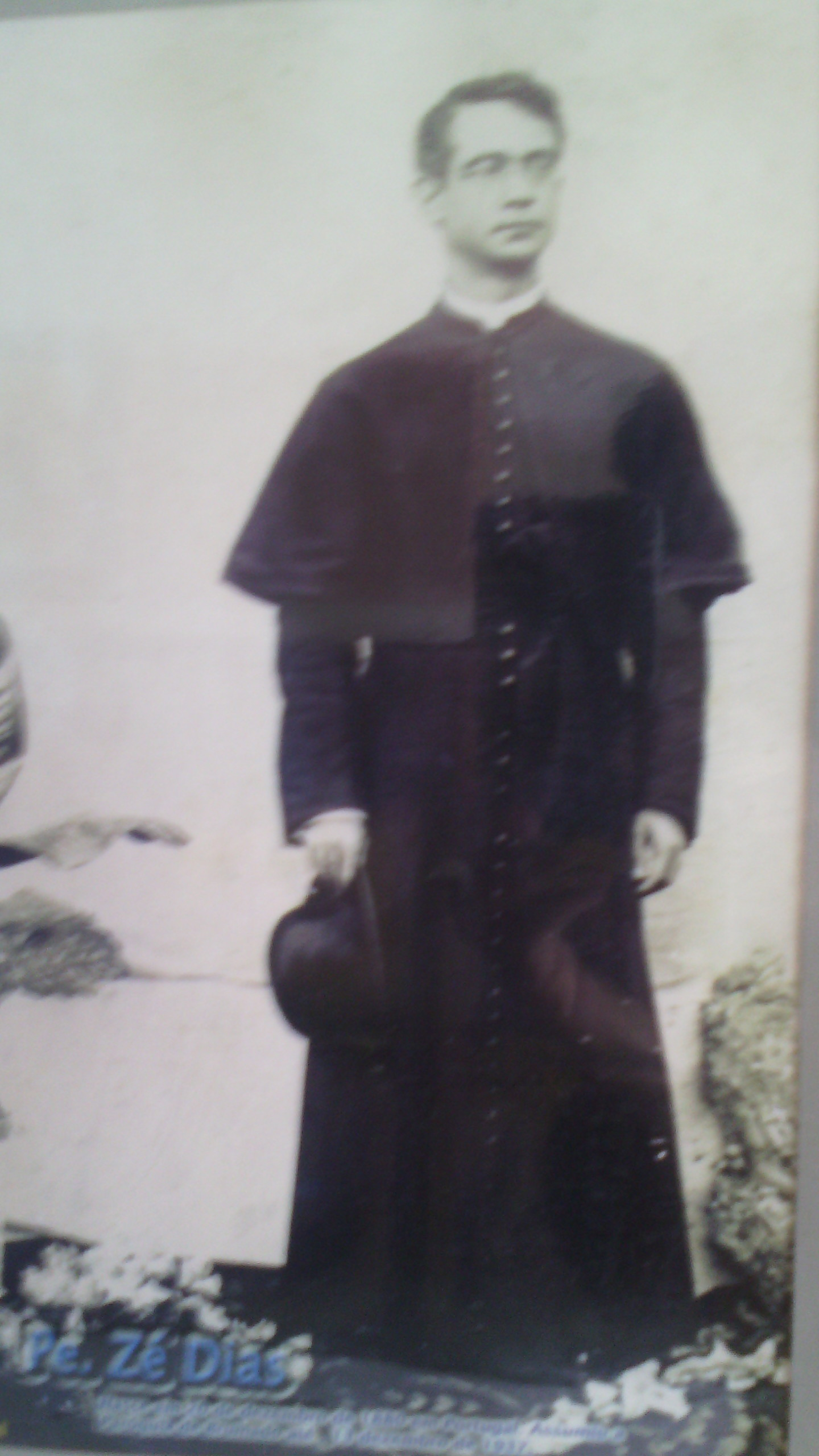 O padre José Dias foi uma figura importante para a política e para a religião em Brumado.